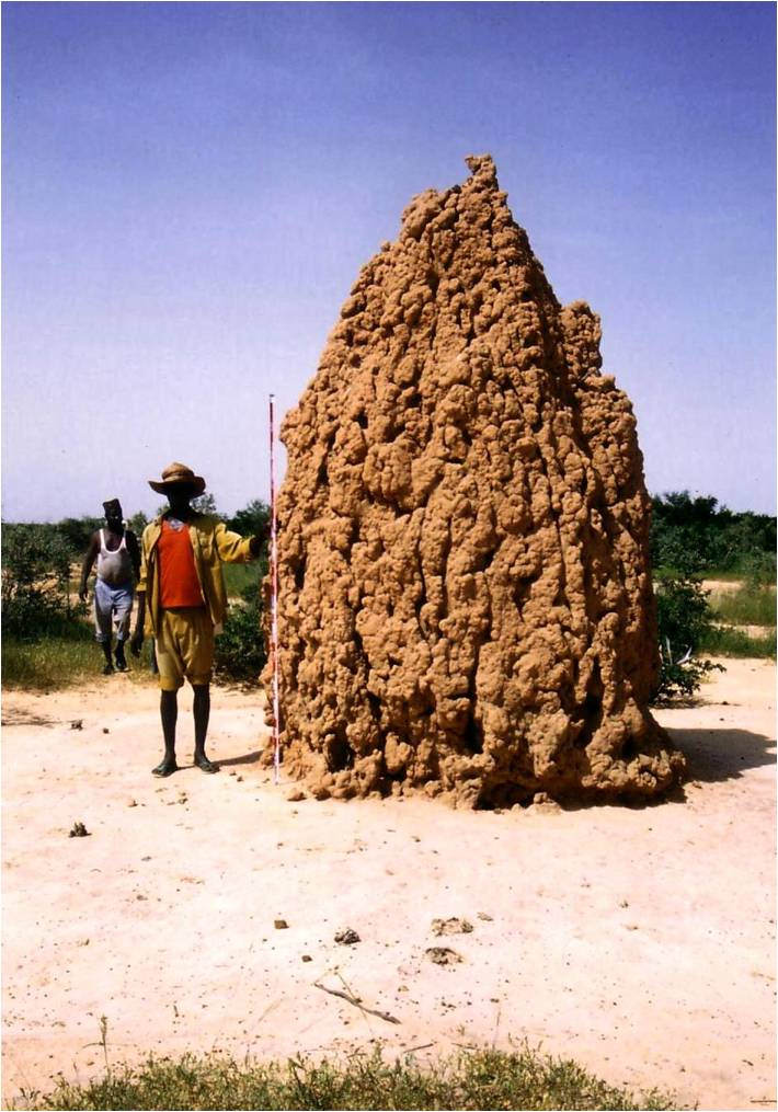 ニジェールには、巨大な蟻塚が点在する。その周辺部には、細かい土壌粒子が流れ出し草の生えない円形状の裸地を形成する。 【ニジェール、バニズンボ村、1989 年12月】